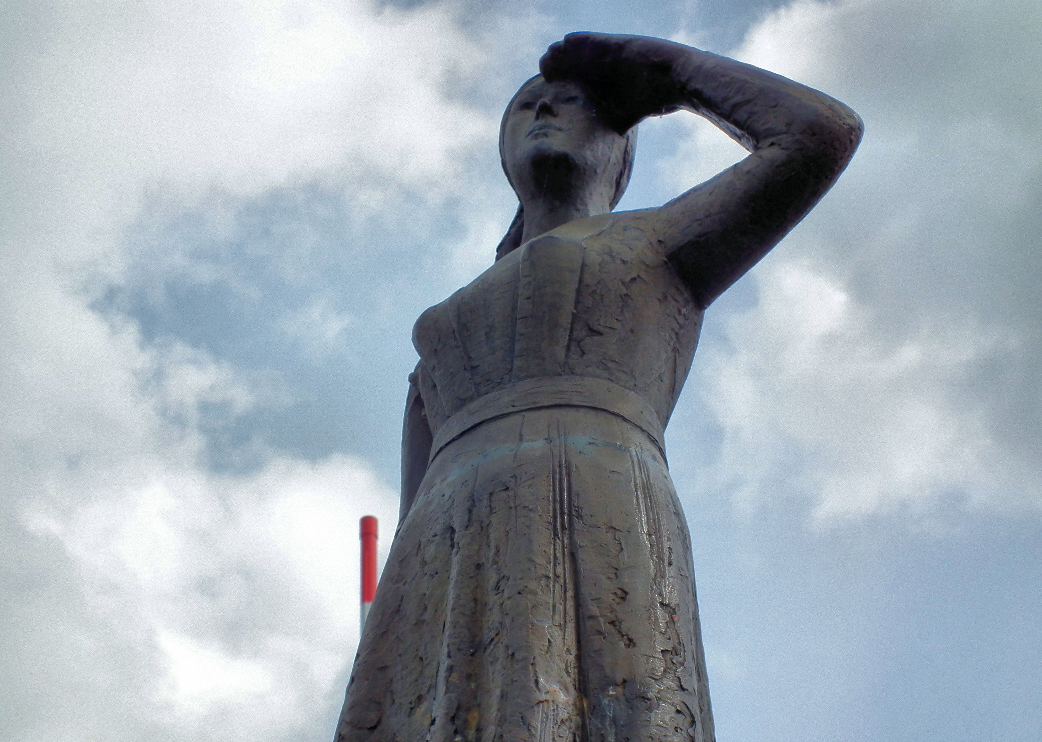 Nederland - Friesland - Stavoren - Stavoren is Hanzestad en Frieslands oudste stad. Pittoreske grachtjes. Een aantal fraaie panden.